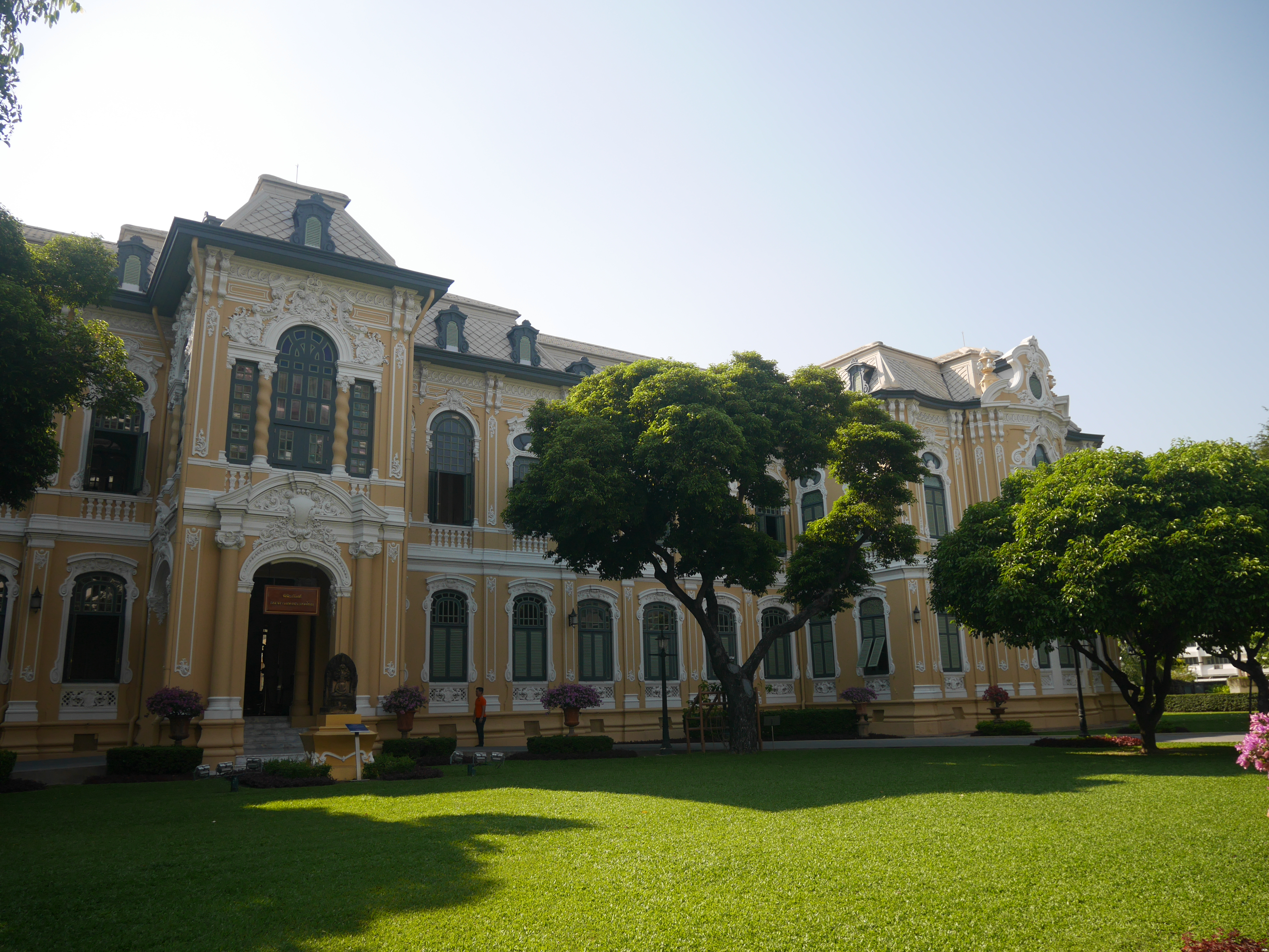 วังบางขุนพรหม(ธนาคารแห่งประเทศไทย) เจ้าของบัญชี กสิณธร ราชโอรส เป็นเจ้าของบัญชีเดียวกับ บัญชี Phonlakrit Sunthornphon ของ Facebook บัญชี Tsutomu RIkimi ของ Google และ Panoramio .com บัญชี ซูบารุโยของ กสิณธร ราชโอรส same account holder of Facebook (Phonlakrit Sunthornphon),Google and (Tsutomu RIkimi) and ซูบารุโย at